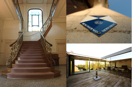 Foto's uit het Huis Van Straelen in hasselt (trap, kenteken monument, verbouwing)